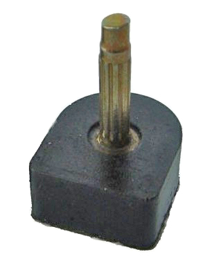 Schuhsohle für den Absatz eines Stöckelschuhs